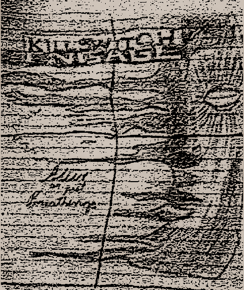 album replica